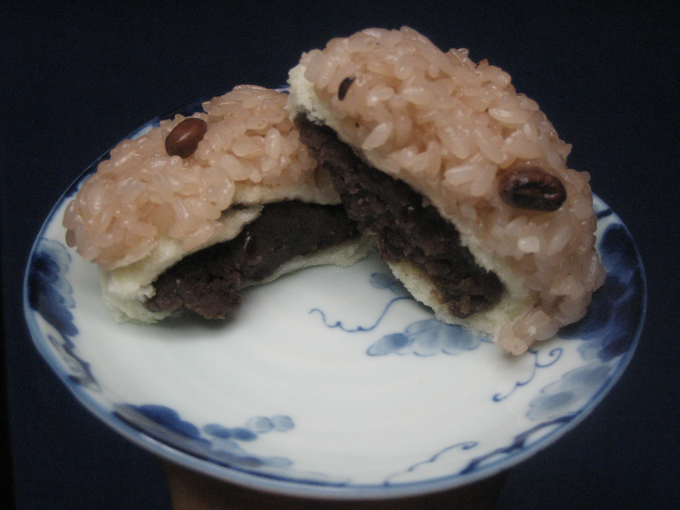 埼玉県加須市で購入した いが饅頭（半分に切った状態）